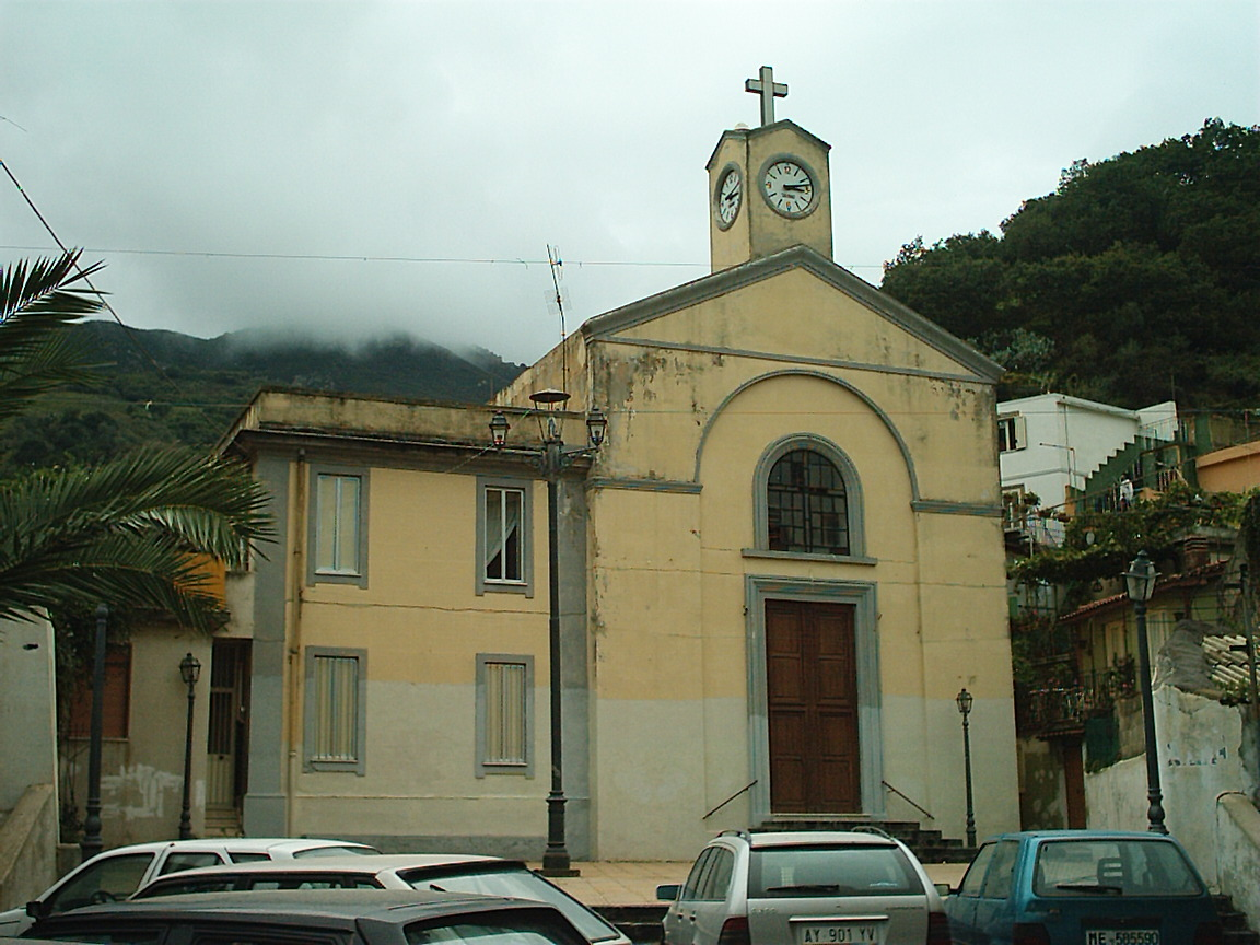 la chiesa parrocchiale di Mili S. Pietro, frazione di Messina (foto Sebastiano Busà)